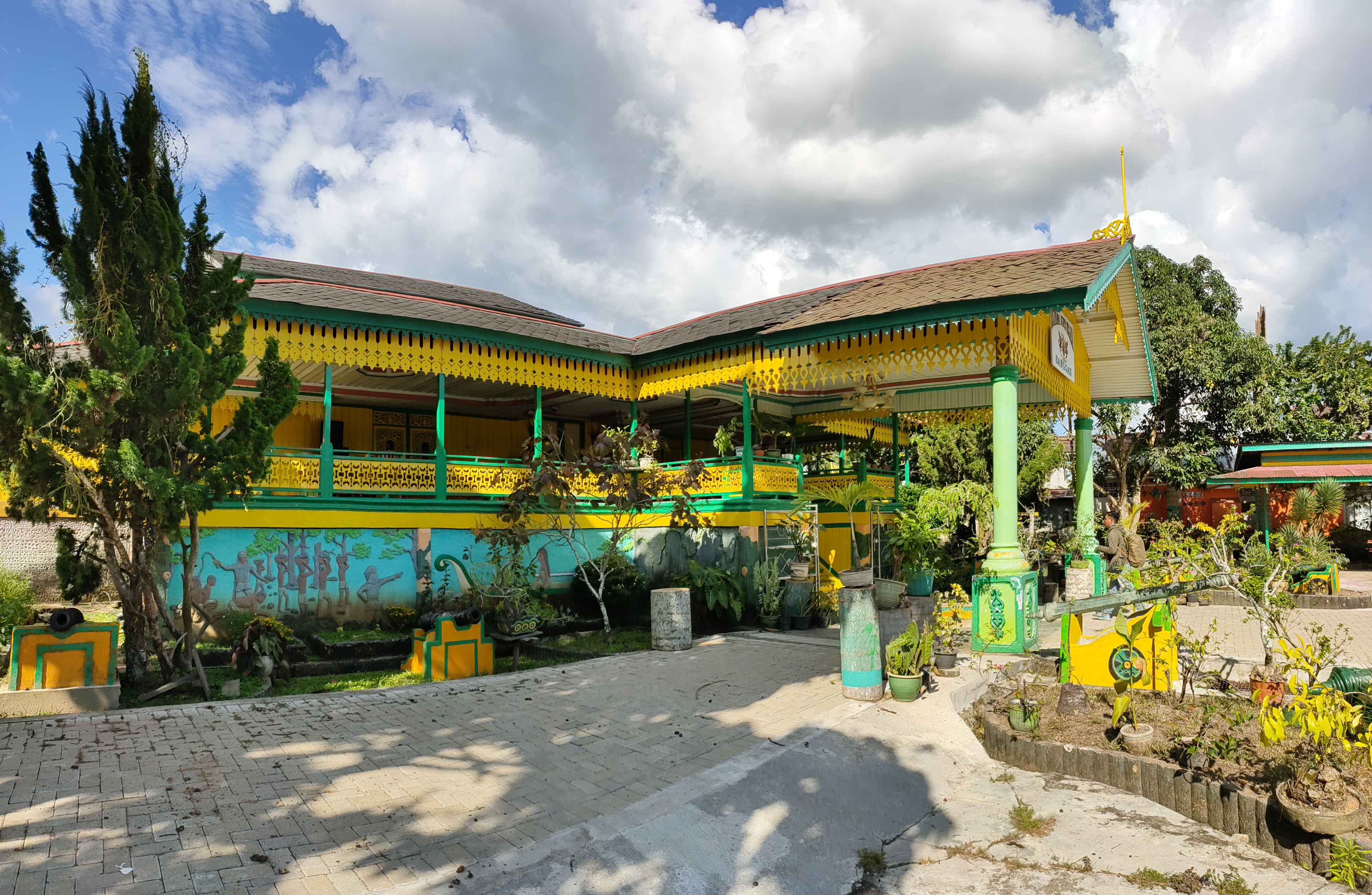 Istana Surya Negara Kerajaan Sanggau di Kabupaten Sanggau, Kalimantan Barat